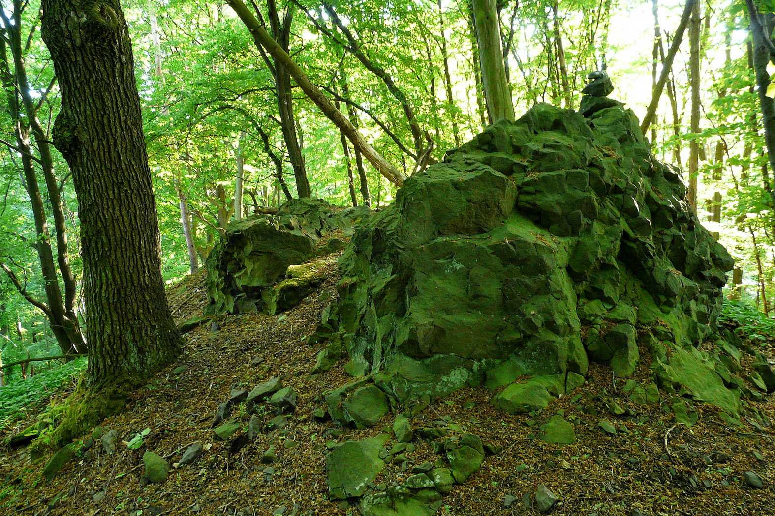 Vrcholový vulkanit Uhelného vrchu, Housecké vrchy